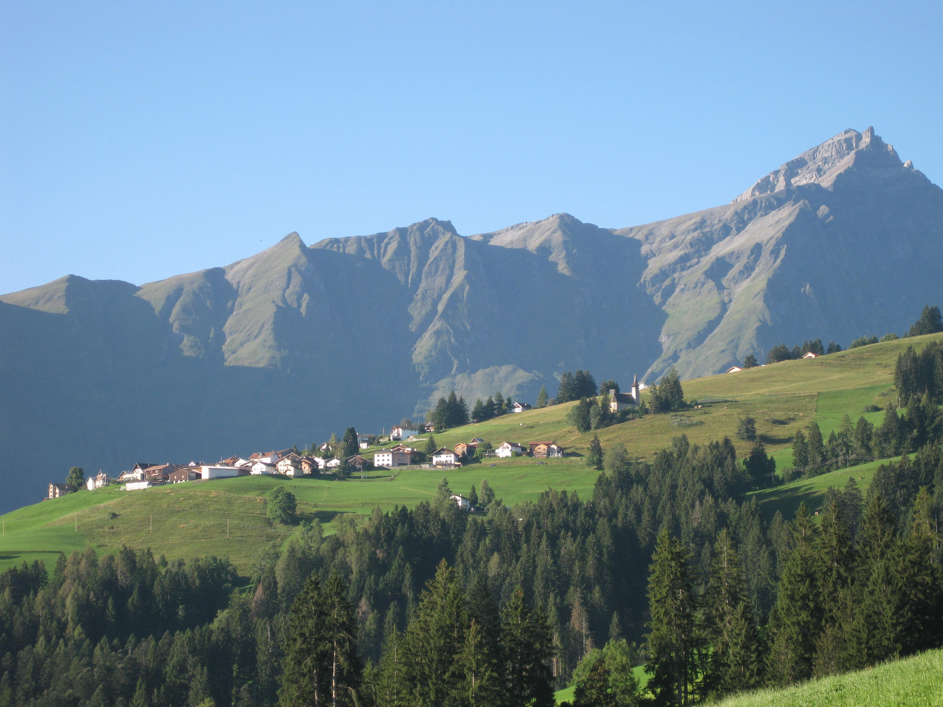 Flerden